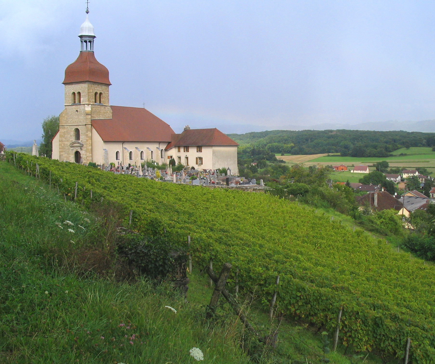 Saint-Lothain, vue générale de l'église - Jura - France